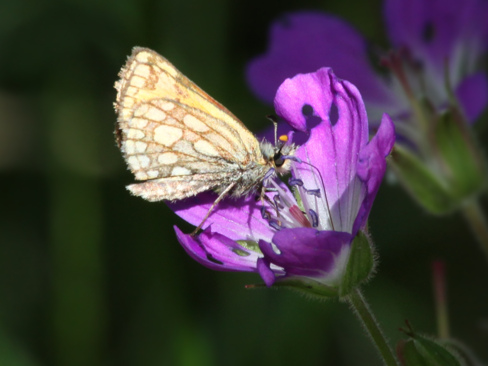 Carterocephalus silvicola (en. Northern Chequered Skipper, sv. Svartfläckig glanssmygare, fi. Mustatäplähiipijä). Ahdenkallio, Hyvinkää, Southern Finland. 13.6.2009.